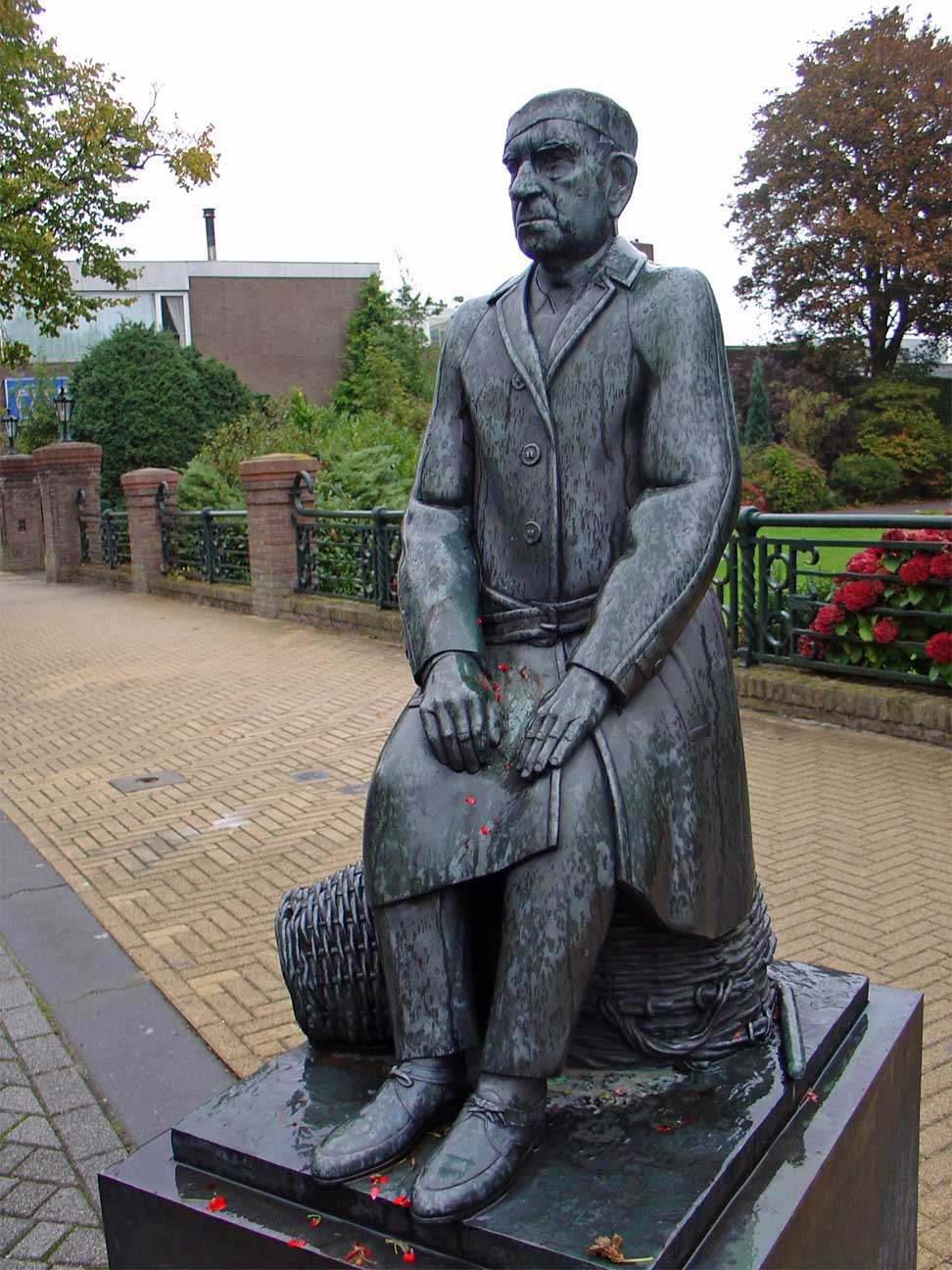 Zittende man op bollenmand door Frans van der Veld - Hoofdstraat Sassenheim